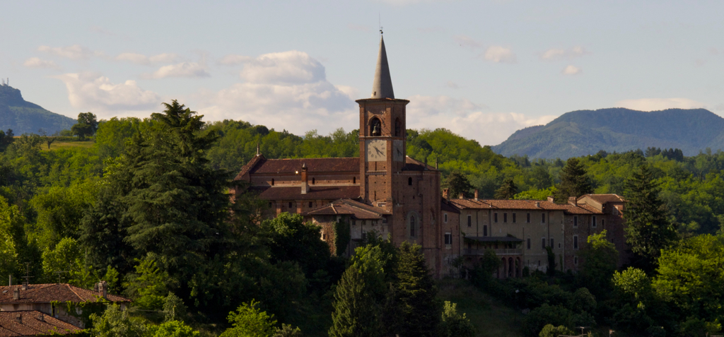 La Colleggiata vista dal Monteruzzo